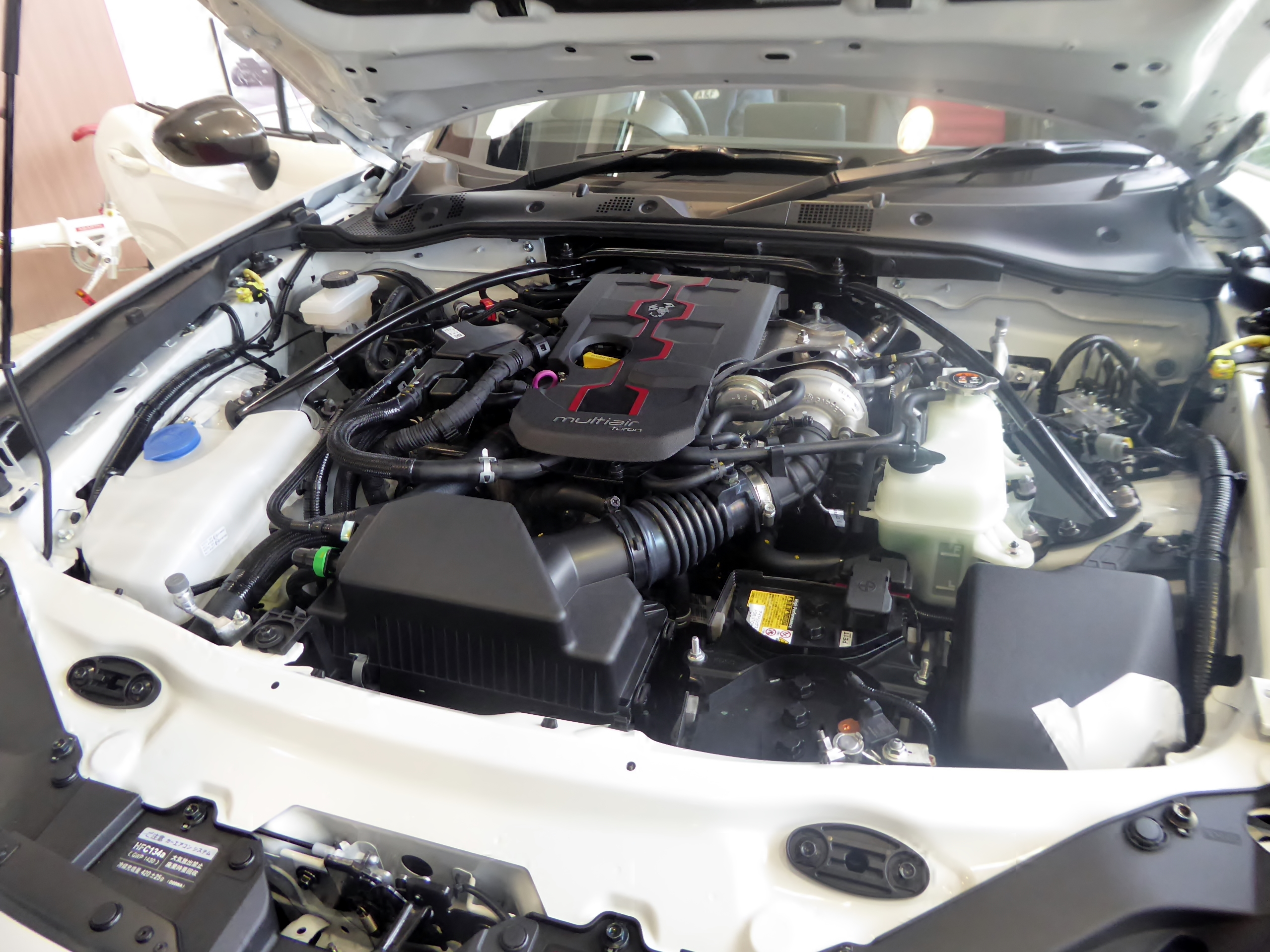 CBA-NF2EK型アバルト・124スパイダーを撮影。